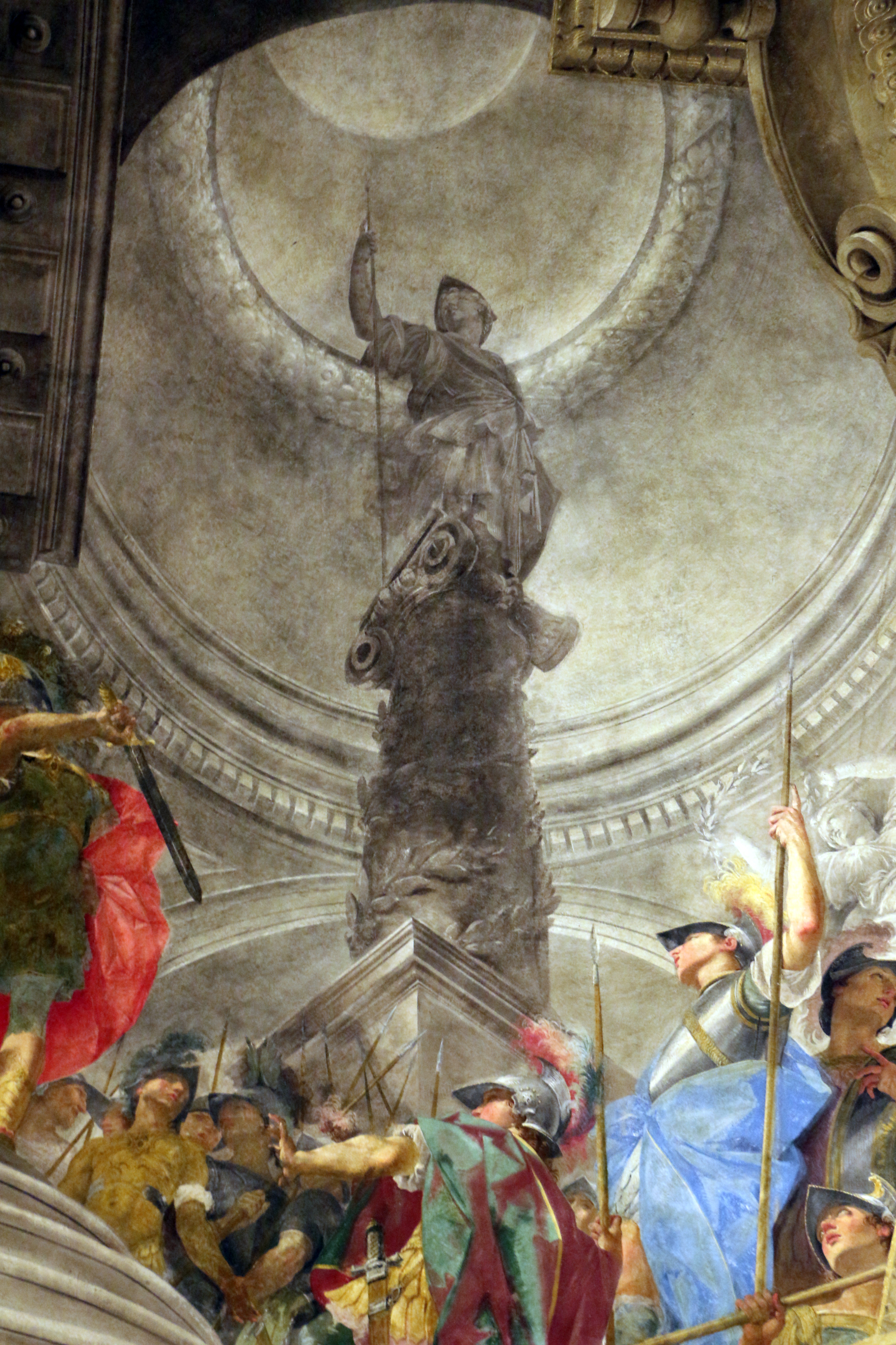 Pinacoteca Nazionale di Bologna in Palazzo Pepoli Campogrande This is a photo of a monument which is part of cultural heritage of Italy.